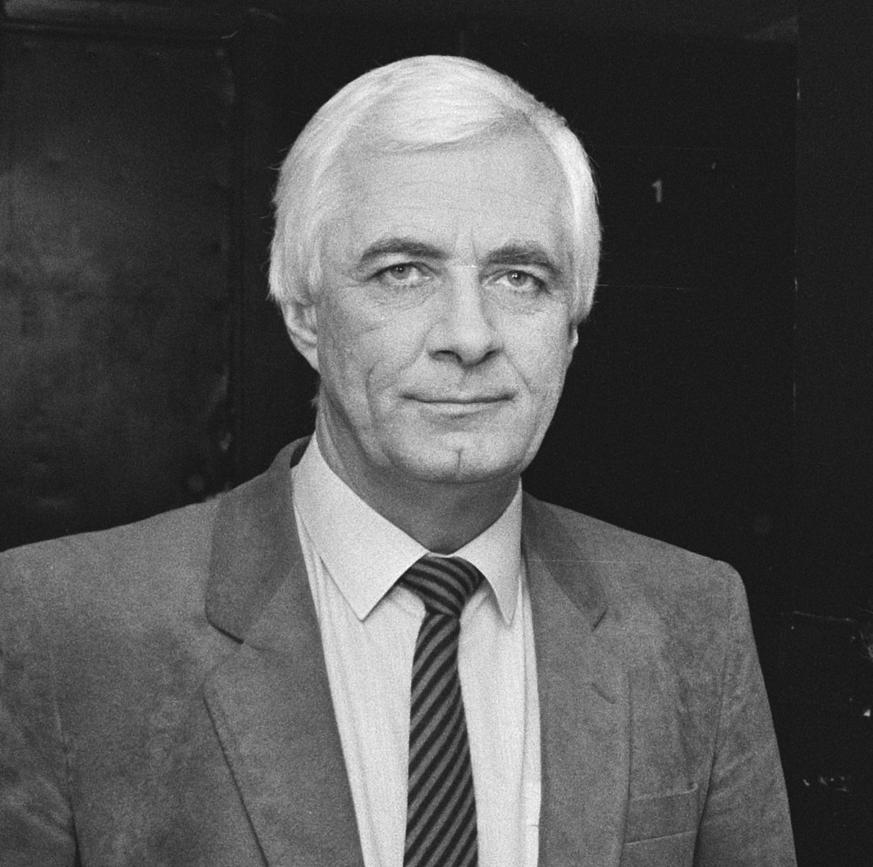 Collectie / Archief : Fotocollectie Anefo Reportage / Serie : [ onbekend ] Beschrijving : Opname "Alles is anders Show" van Aad van den Heuvel met Wim Kan in Nieuwe de la Mar theater: Aad van den Heuvel Datum : 30 december 1981 Locatie : Amsterdam, Noord-Holland Trefwoorden : cabaret, televisieprogramma's Persoonsnaam : Heuvel, Aad van den Fotograaf : Antonisse, Marcel / Anefo Auteursrechthebbende : Nationaal Archief Materiaalsoort : Negatief (zwart/wit) Nummer archiefinventaris : bekijk toegang 2.24.01.05 Bestanddeelnummer : 931-8863